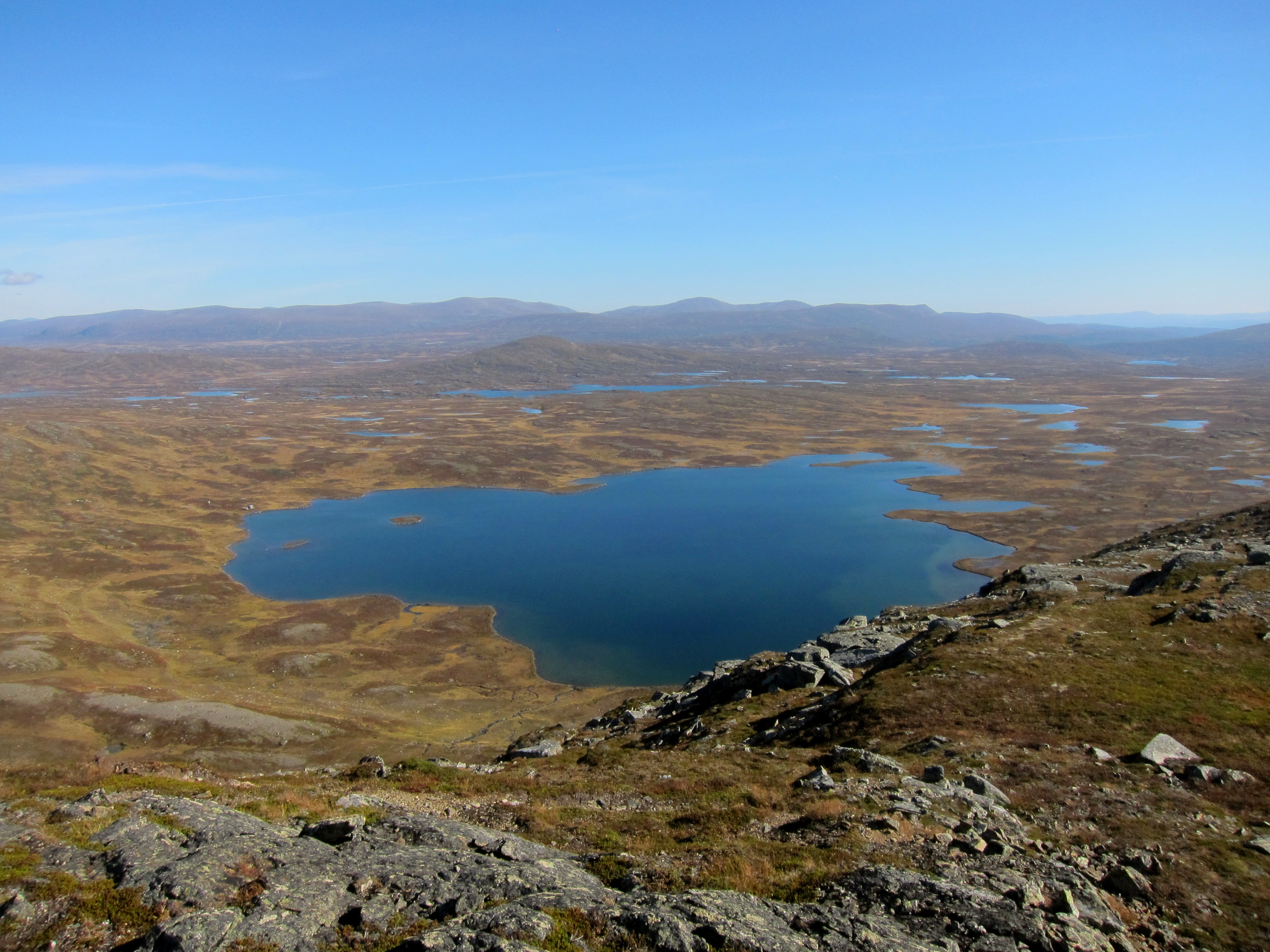 Snusesjön during late summer, 2014.